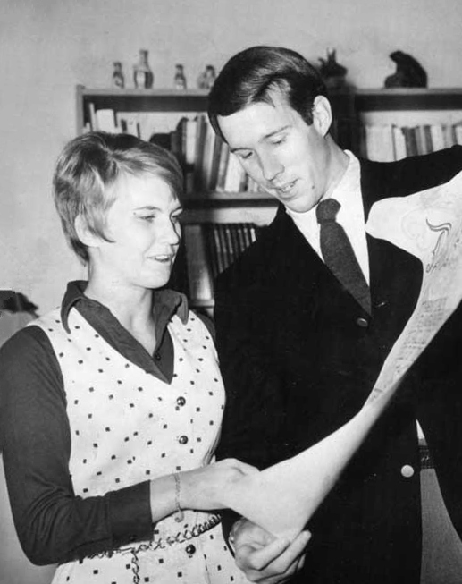 Annika Rohlén and Dick Railsback in Stockholm